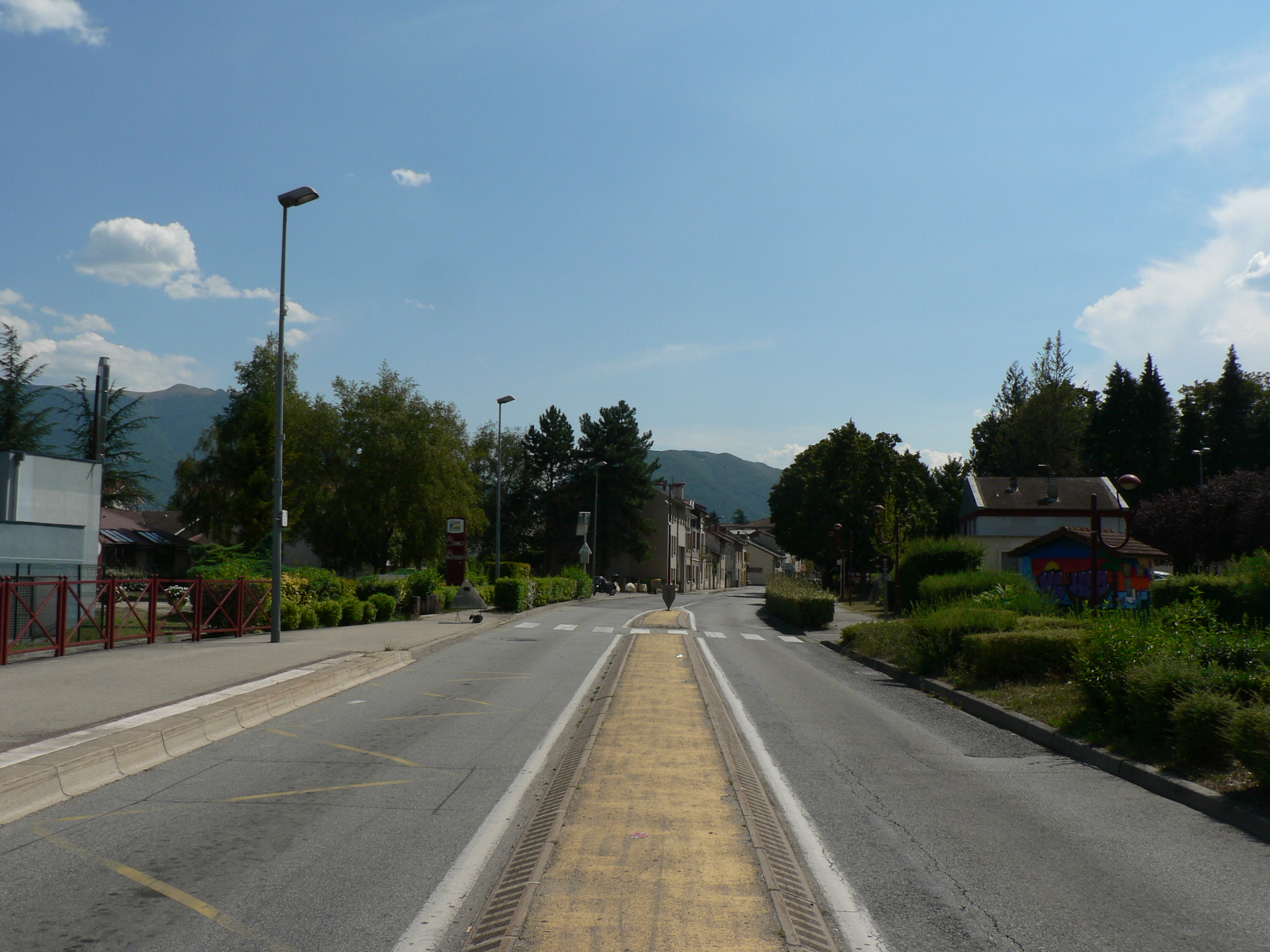 N75 à Varces. Varces-Allières-Risset, Isère, AuRA, France.